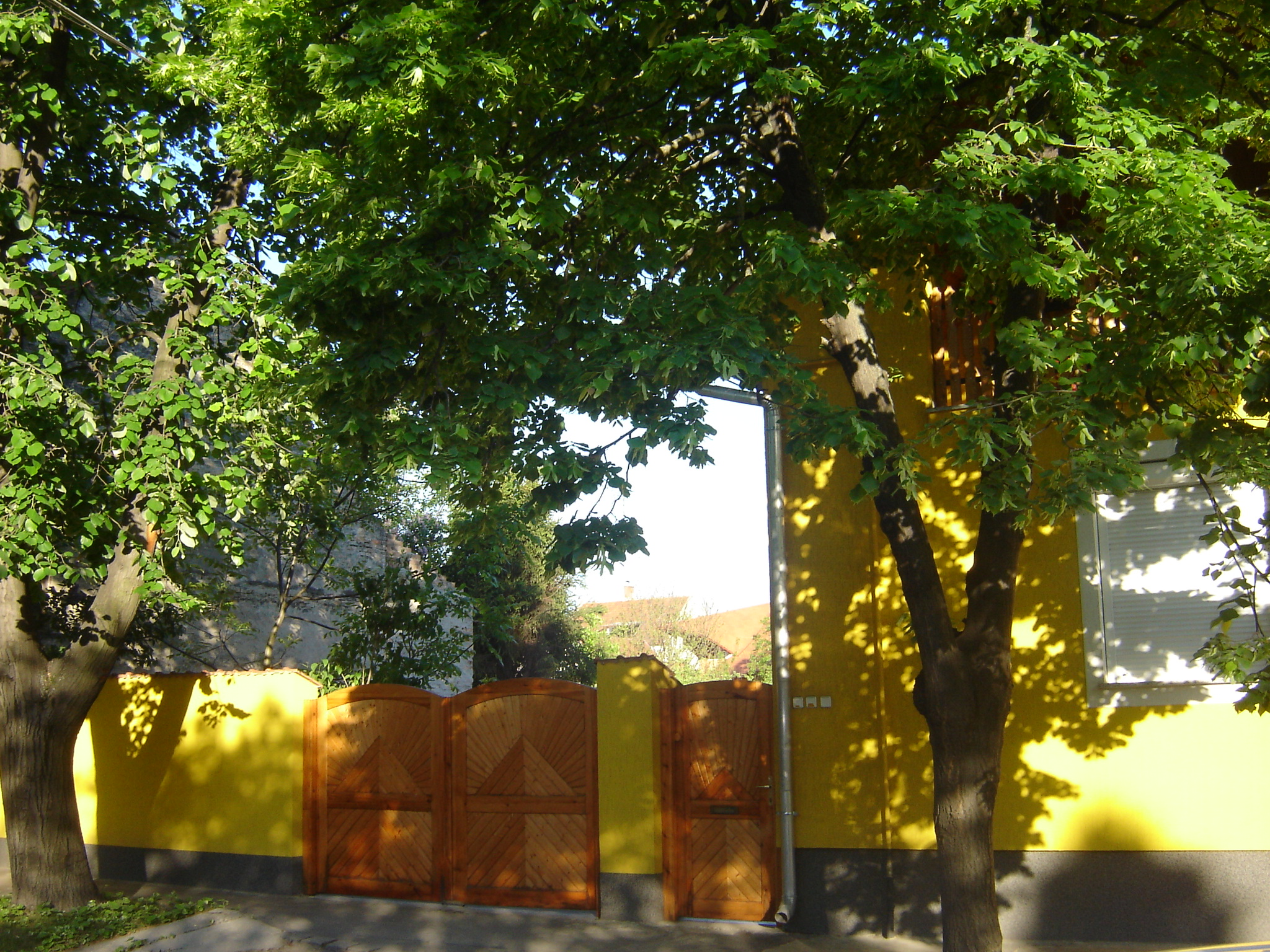 Új napsugárdíszes kapu, Szeged-Alsóváros, Kisfaludy utca